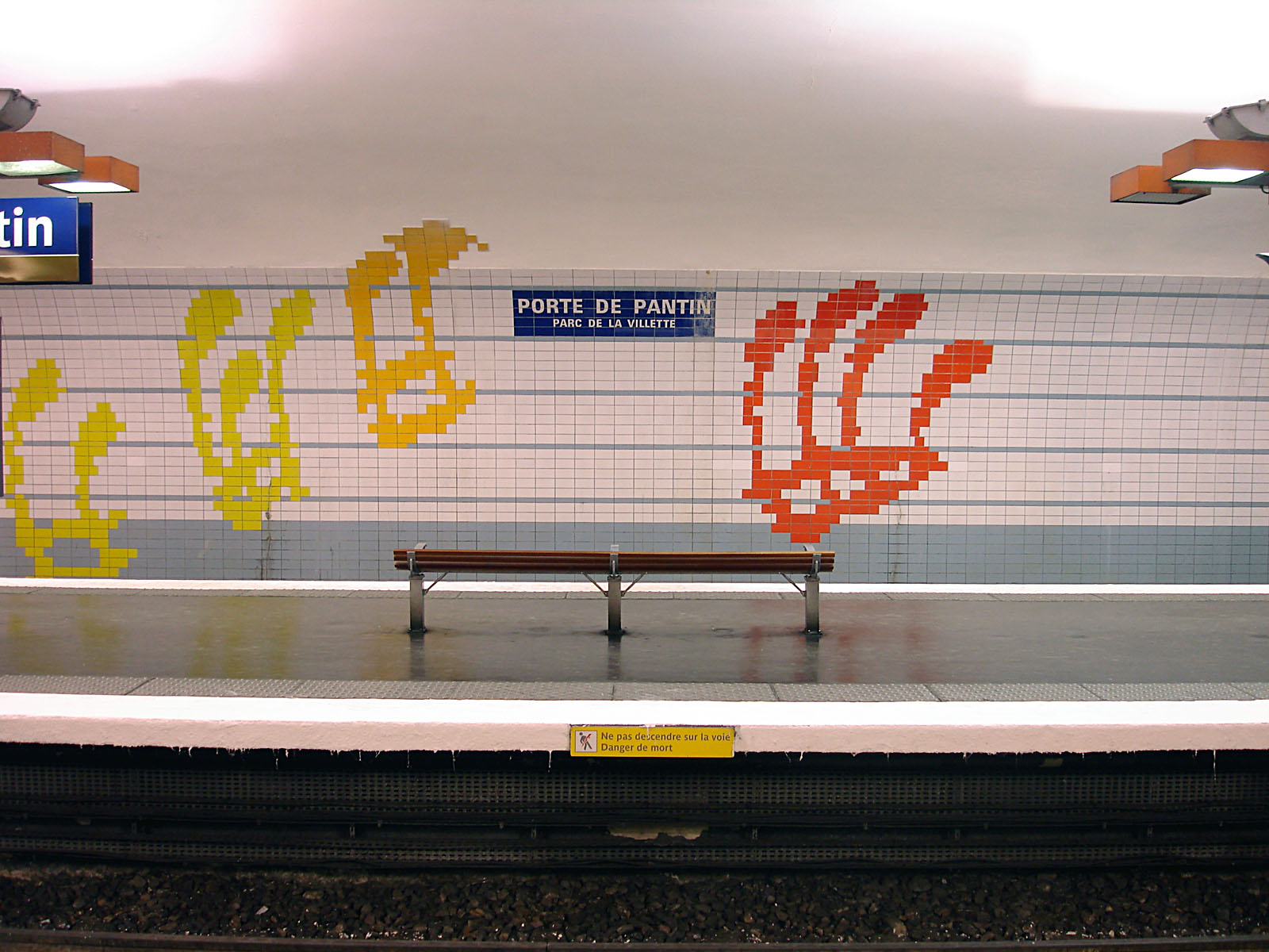 La station Porte de Pantin de la ligne 5 du métro de Paris, France.